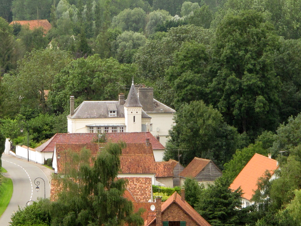 La Madelaine-sous-Montreuil château